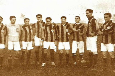 Betis Football Club en 1909, antes de su oficialización en 1910